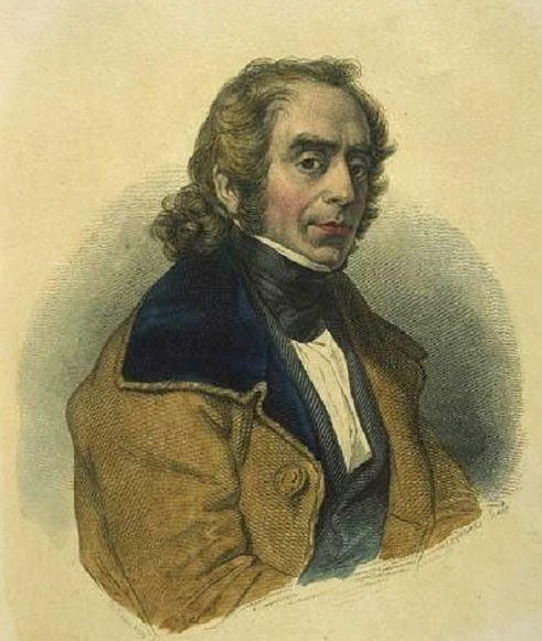 "Jacques Arago", colored